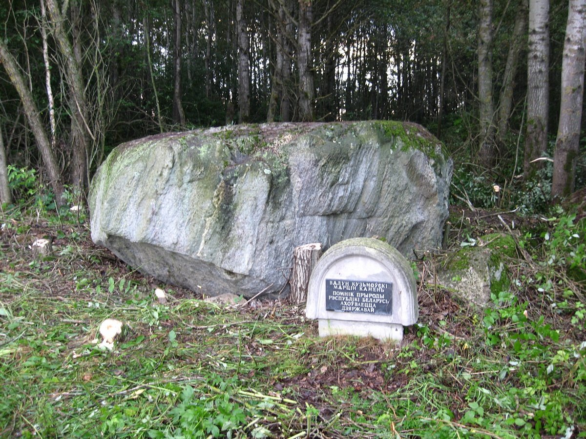 Кузьмы. Кузьмоўскі Марцін камень